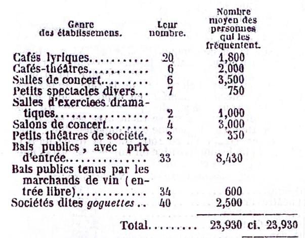 Statistique hostile et orientée sur les lieux de spectacle populaire à Paris.